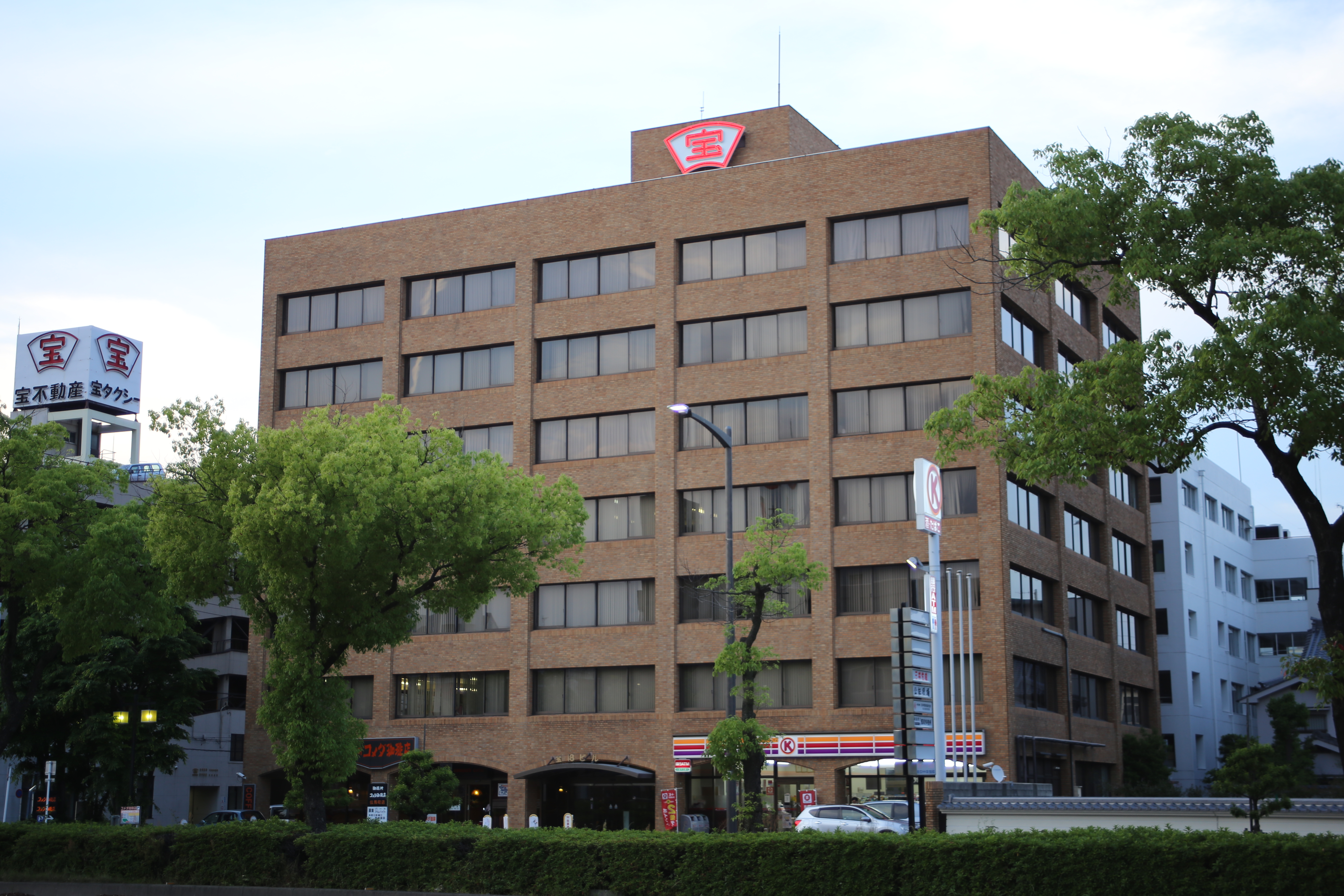 名古屋市熱田区神宮四丁目の宝18ビルを南側公道東側より撮影